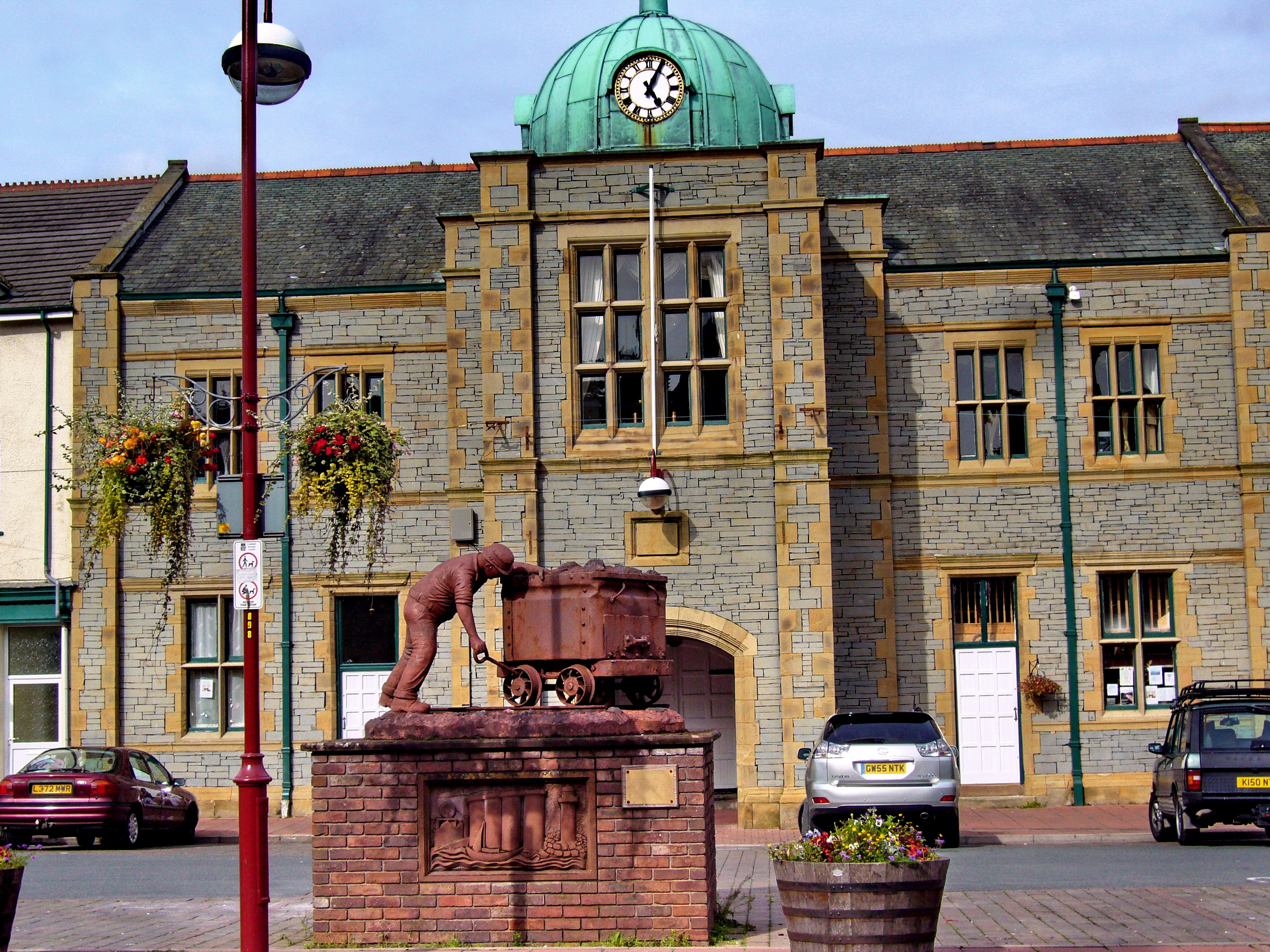 Millom